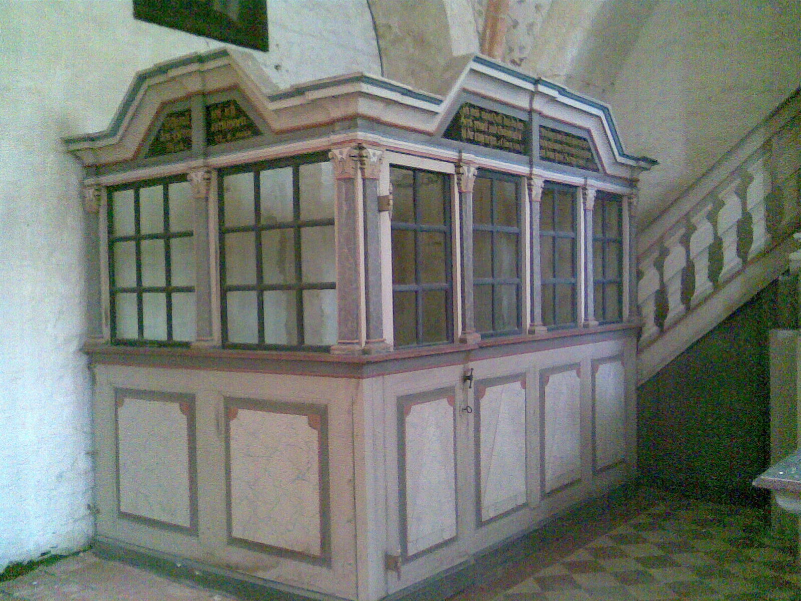 Kirche Zirkow Chorgestühl